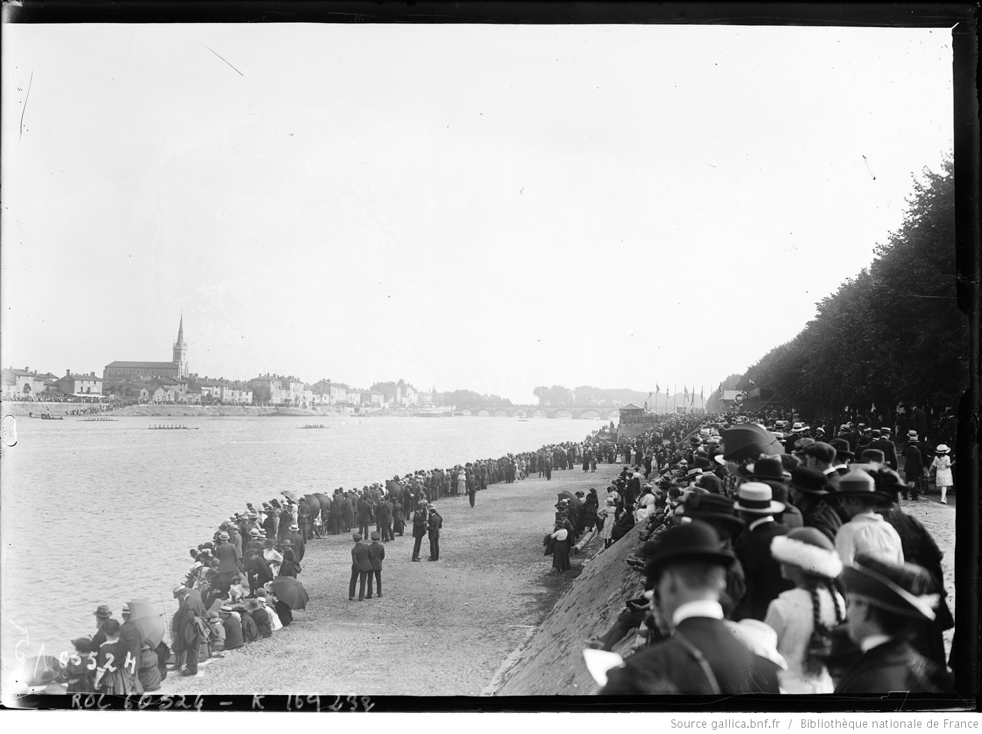 Mâcon, vue générale, arrivée du 8 rameurs en pointe [15/8/20, championnats d'Europe d'aviron] : [photographie de presse] / [Agence Rol]